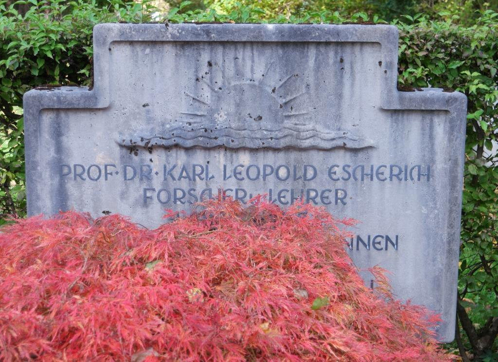 Grab des Forstwissenschaftlers und Entomologen Karl Leopold Escherich (1871-1951) auf dem Westfriedhof in München